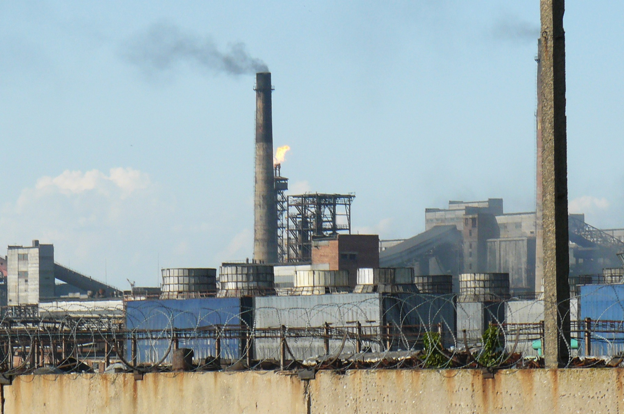 Coke-chemical plants. Avdijivka.